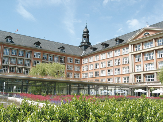 Blick vom Innenhof auf das Klinikhauptgebäude in Saalfeld